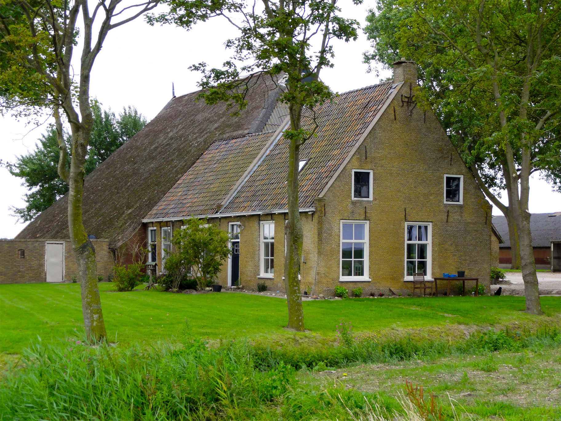 Boerderij aan de Hoarnestreek19 in Oosterbierum